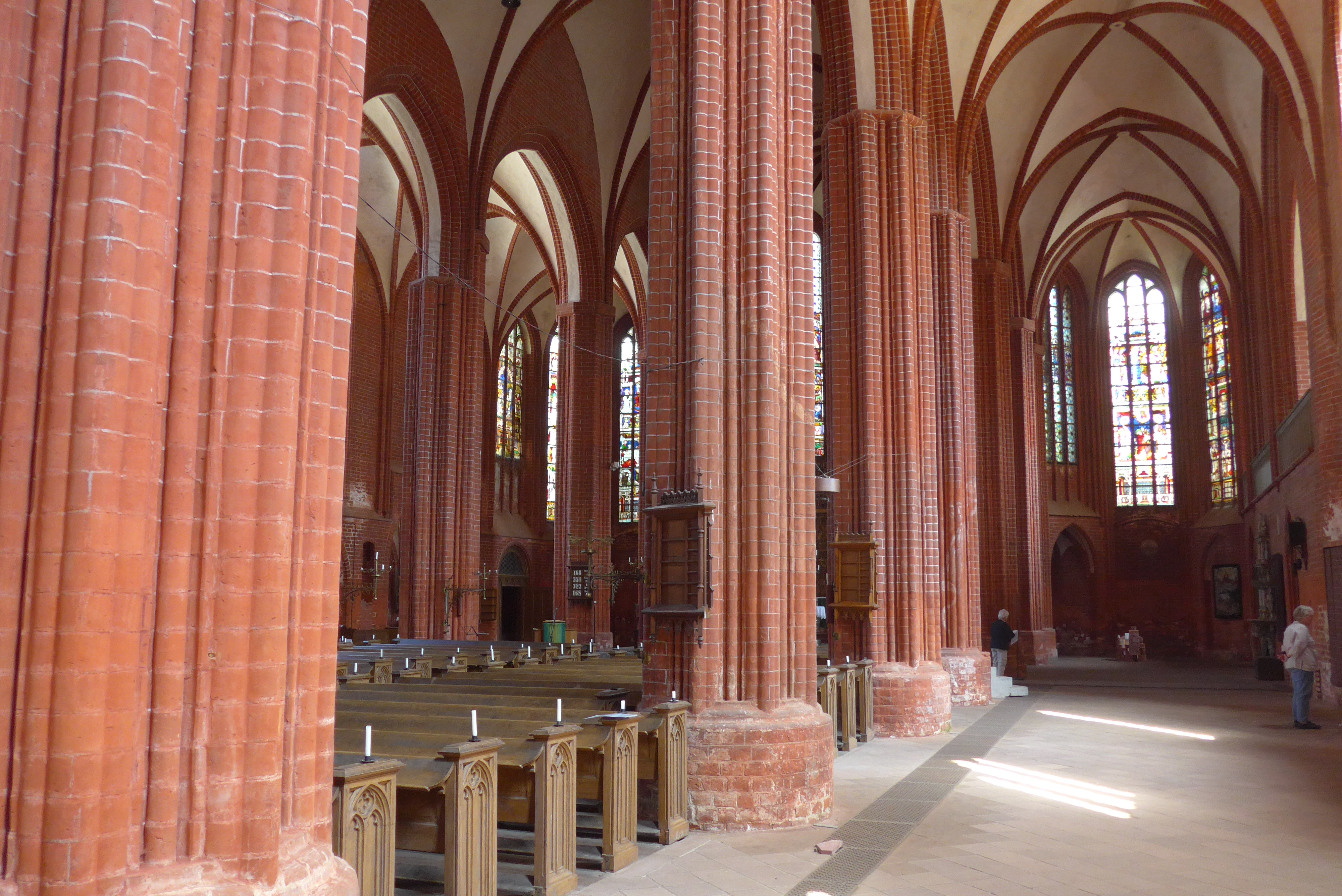 Seitenschiff St. Johannis, Werben (Elbe), 15. Jahrhundert